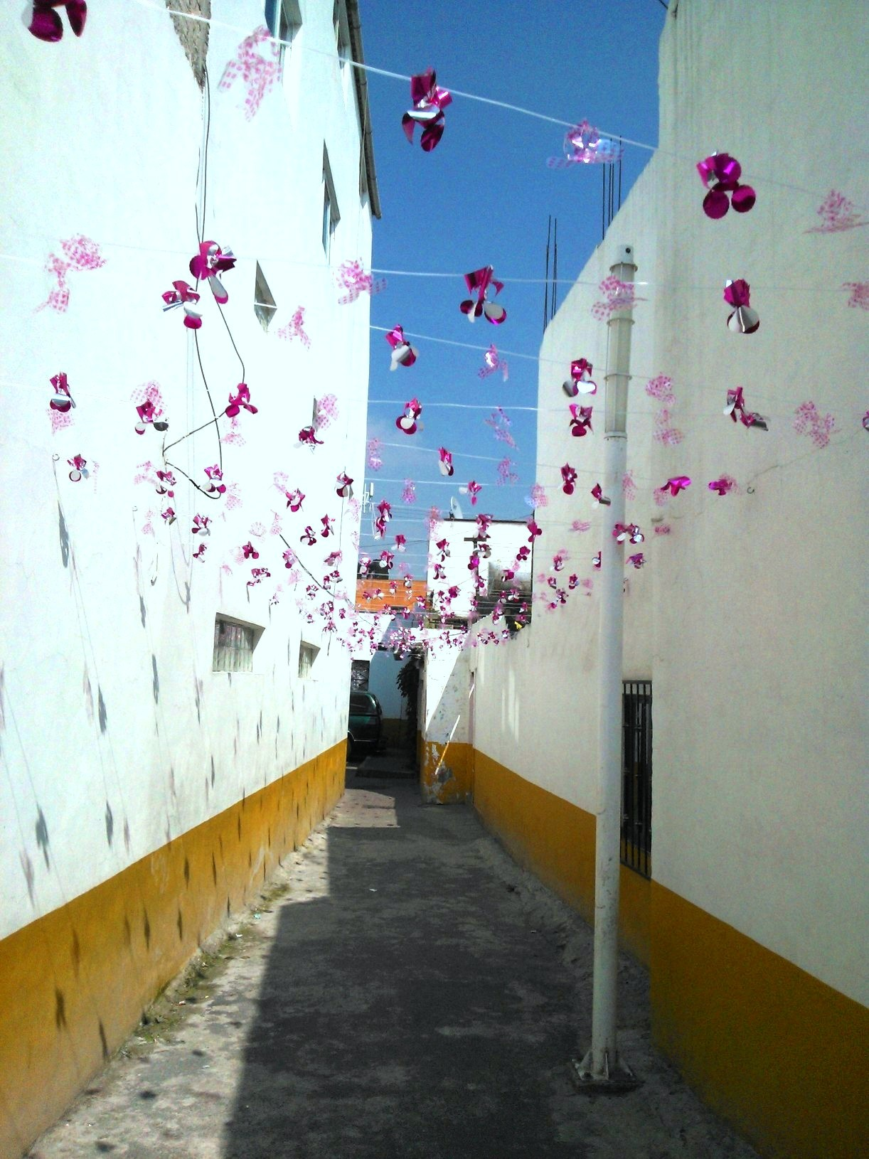 Callejon en Santa Anita Zacatlamanco